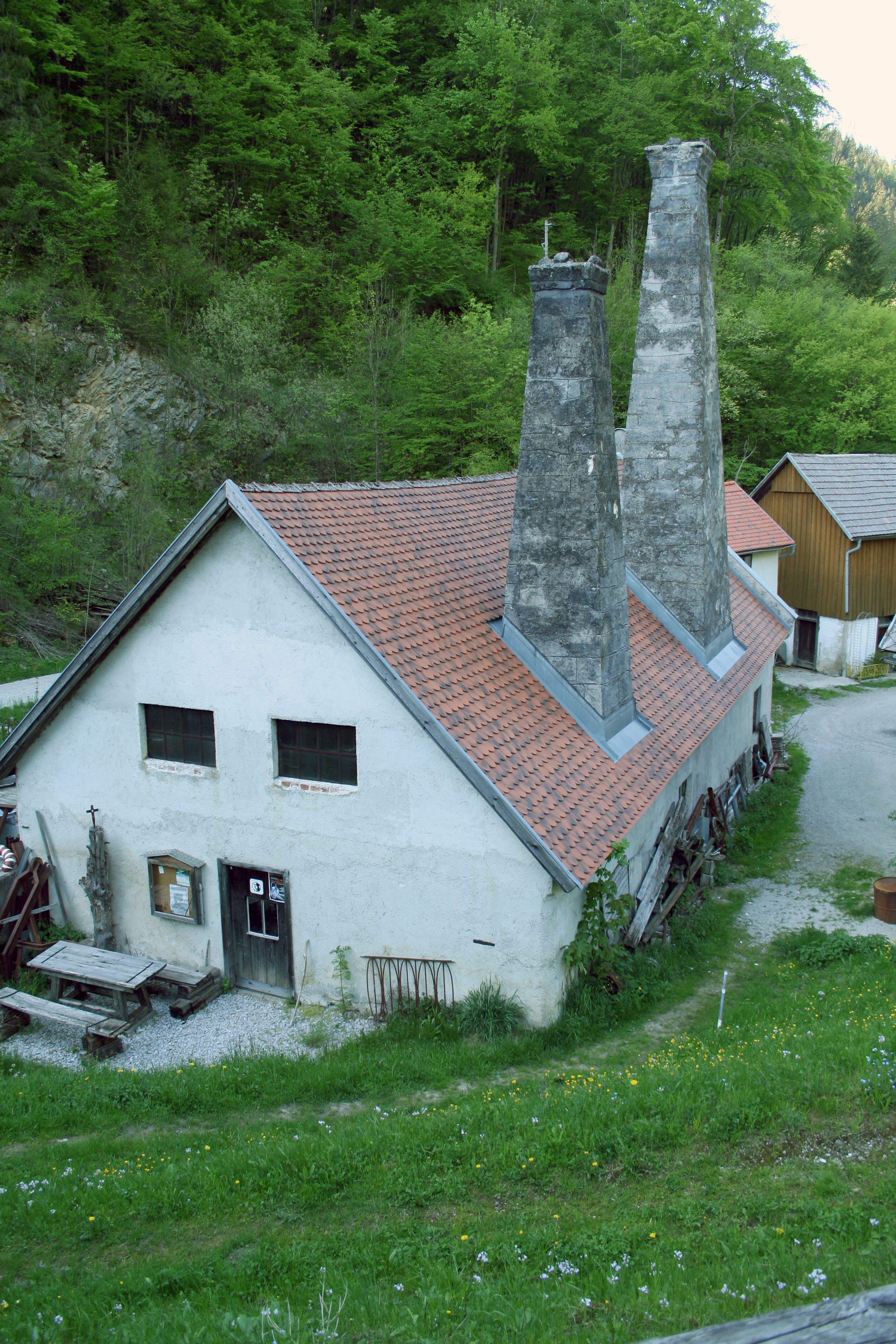 Einödhammer in Ybbsitz